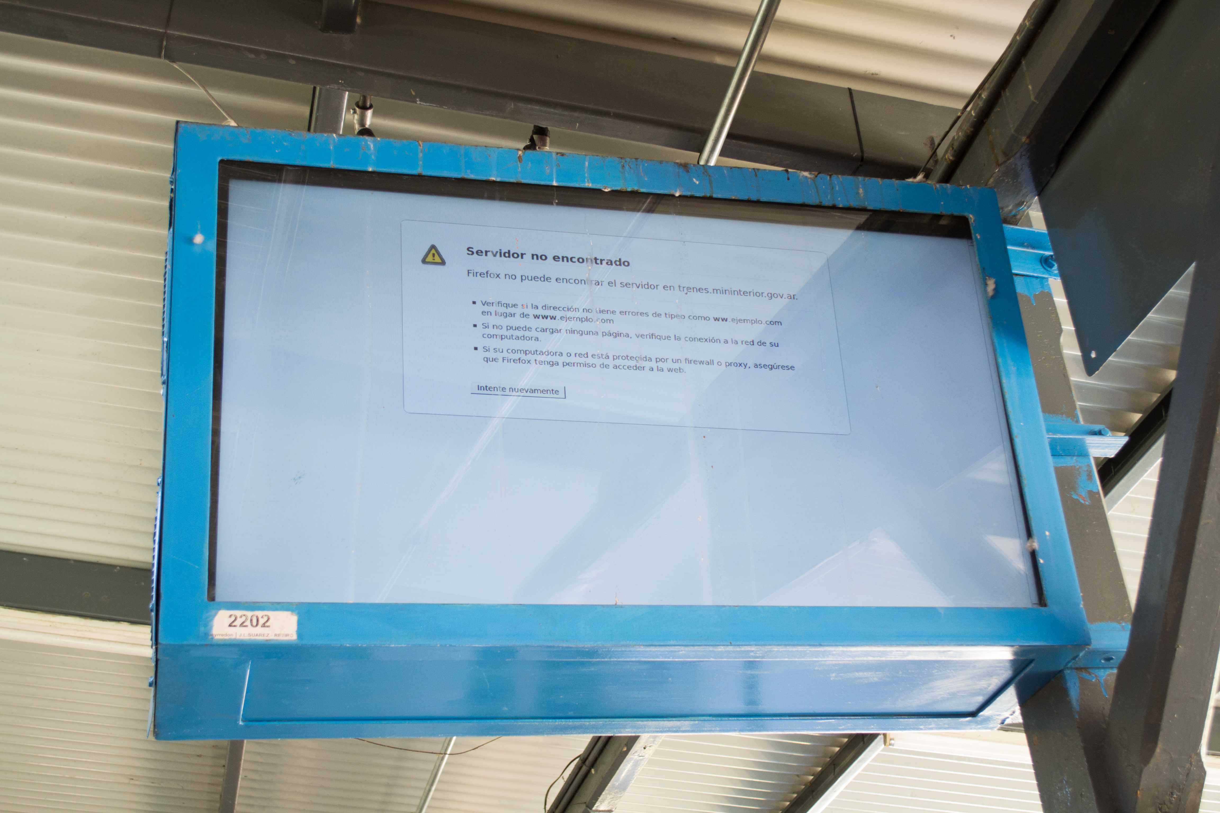 Navegador Firefox utilizado en los sistemas de información al pasajero en la Línea Mitre, en Argentina.